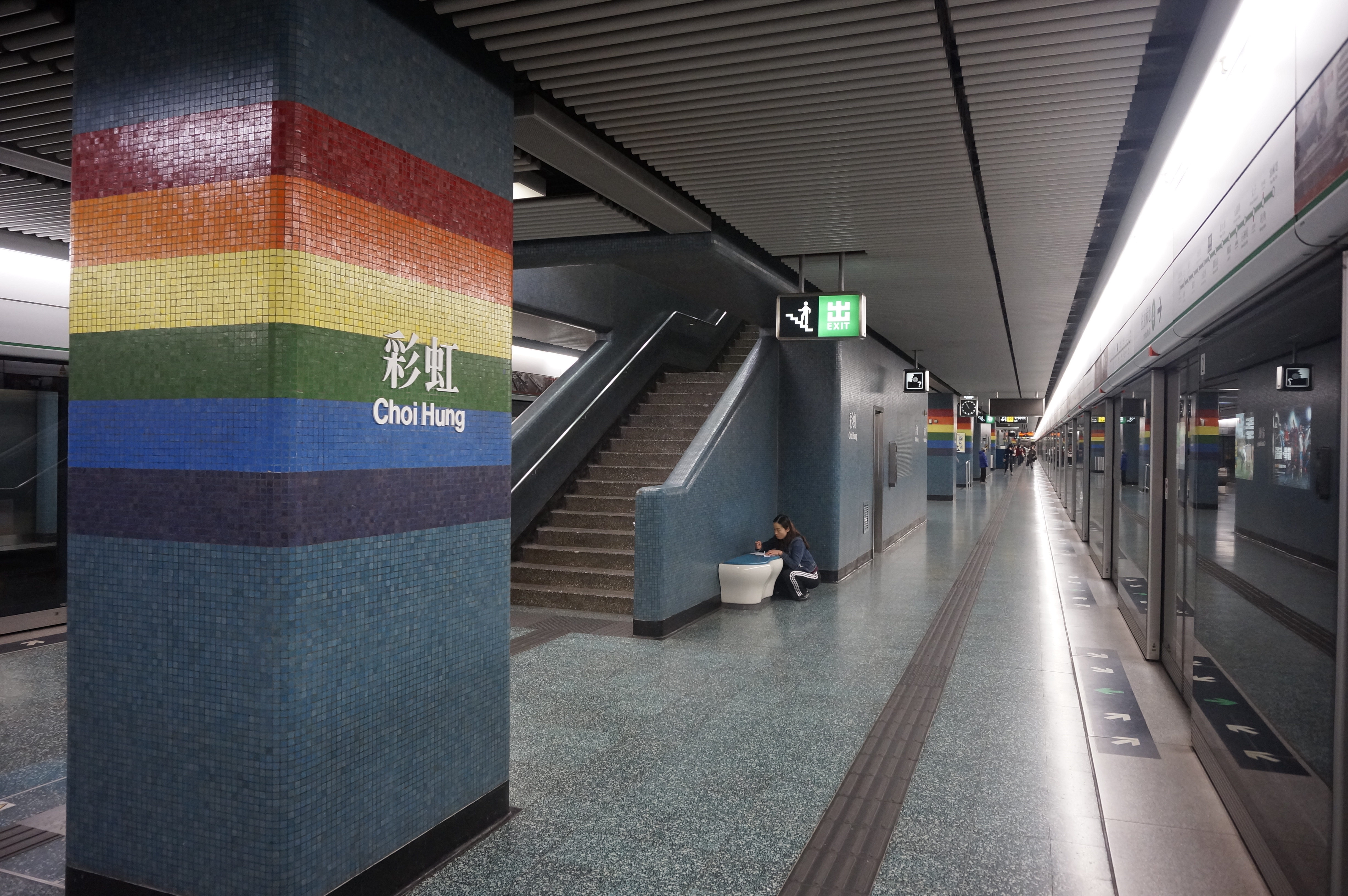 港鐵彩虹站月台